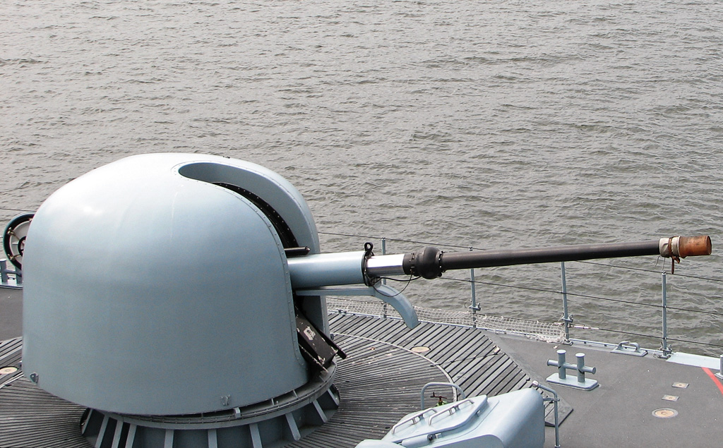 Beschreibung: 76 mm Buggeschütz eines Schnellboots der Gepard-Klasse Fotograf: Darkone, 13. August 2005